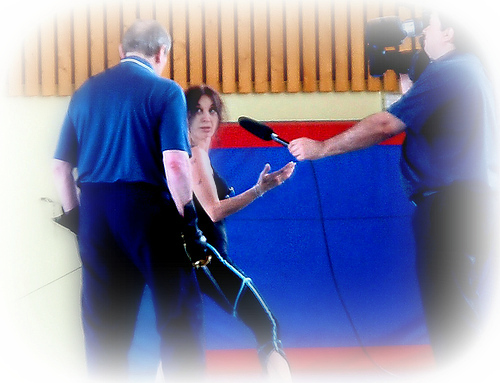 El maestro Claude Carliez padre de la esgrima artística y presidente de la Academia de Armas de Francia, impartiendo sus conocimientos mas allá de su trabajo de especialista, coreógráfo y doble de acción, llevó una vida completamente dedicado a la enseñanza de esta modalidad por el mismo creada.